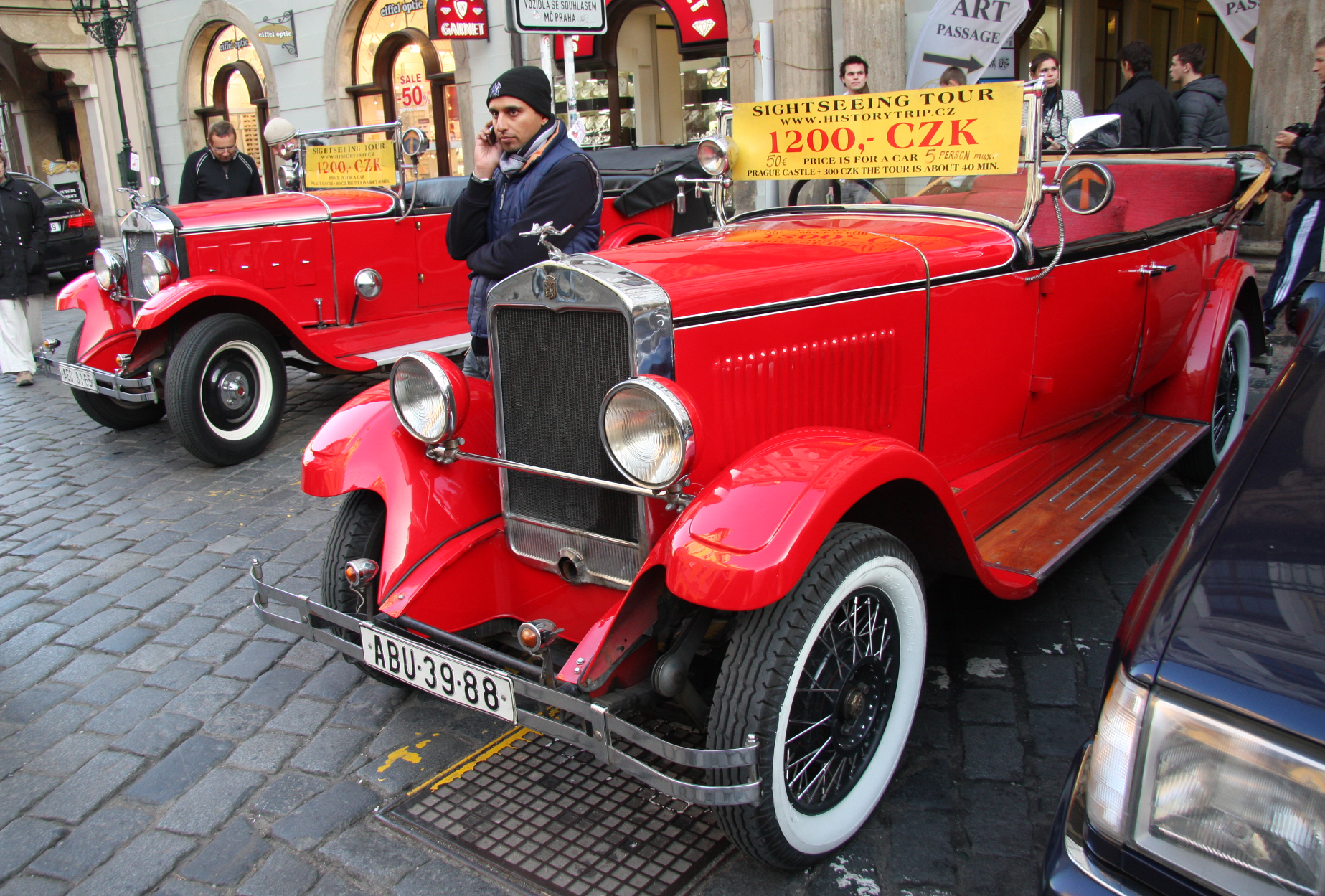 Praga Alfa Cabriolets